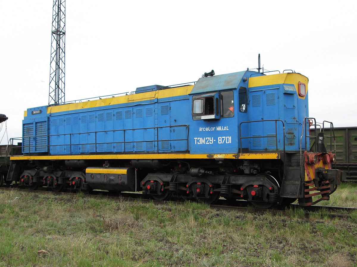 ТЭМ2У-8701